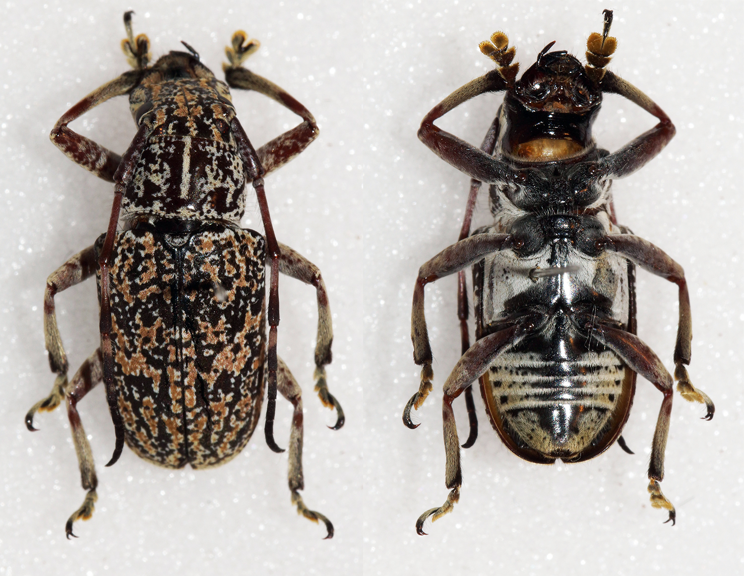 White,1856 Sex: ? Data: 03-10-03 - Sipitang - Sabah - Malaysia Size: 13mm